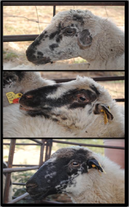 Patron de manchas de la cabeza de la oveja colmenareña